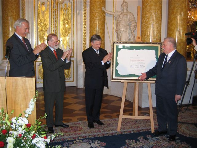 Polish ministers of Foreign Afairs: Andrzej Olechowski (b. 1947), Polish politician, Bronisław Geremek (1932-2008), Polish historian and politician, Włodzimierz Cimoszewicz (b. 1950), polish politician and Lech Wałęsa (b. 1943), Polish politician, Nobel Prize laureat